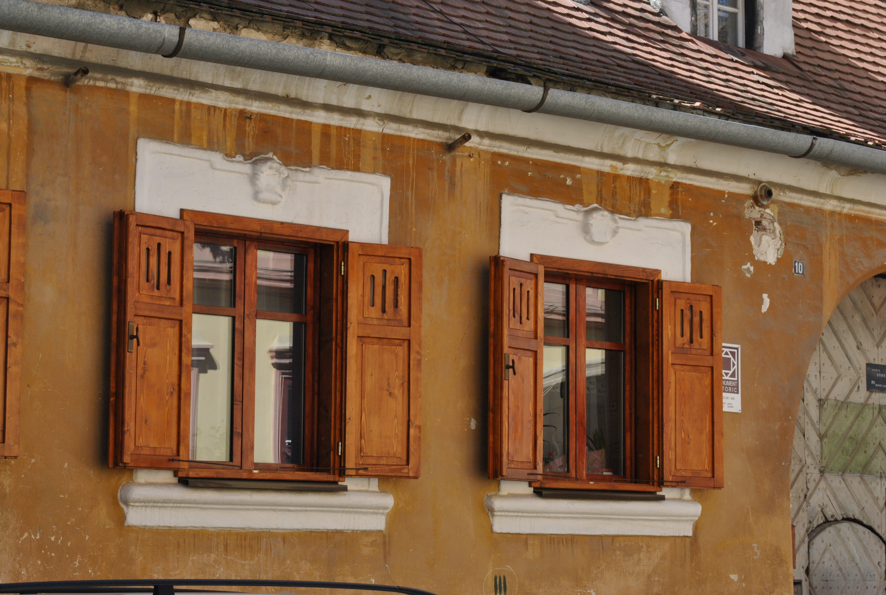 Casă, a doua jum. sec. XV, (1473 ?), 1576, 1696, 1701, mijl. sec. XIX